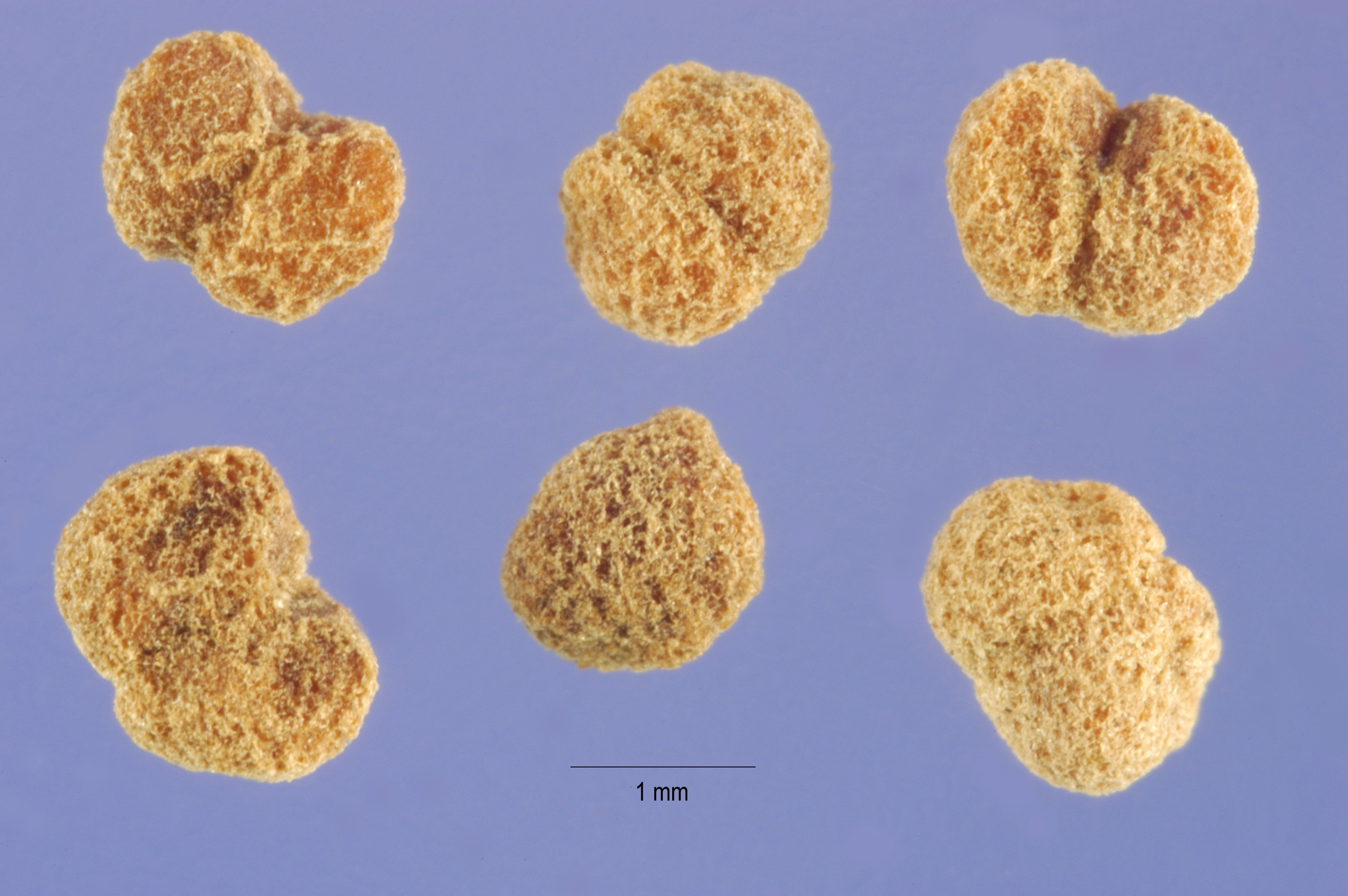 Cuscuta epilinum seeds